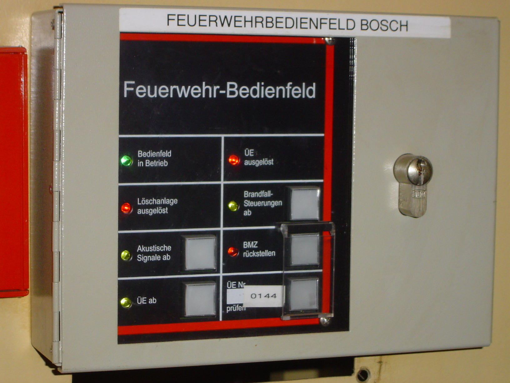 Das Bild zeigt ein Feuerwehr-Bedienfeld aufgenommen in der BMA des Hessischen Staatstheaterts in Wiesbaden